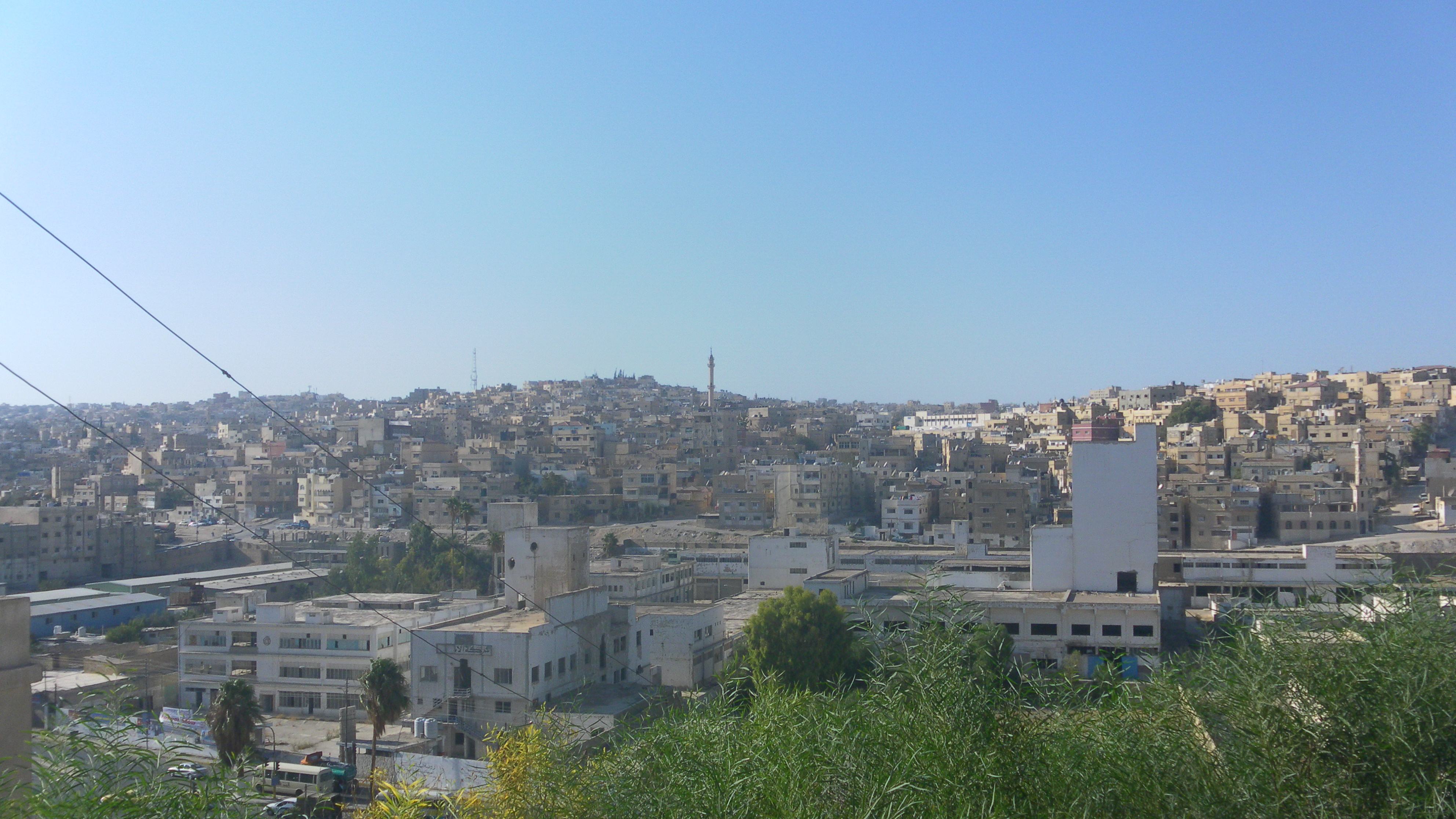 منظر من الجبل الشمالي في الرصيفة, الزرقاء، الأردن